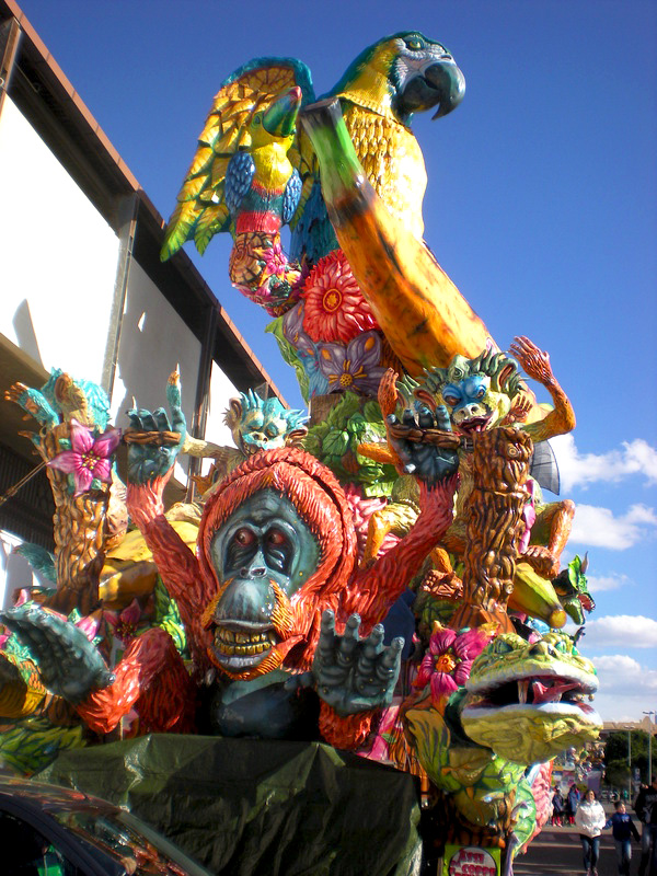 Carro allegorico Massafra